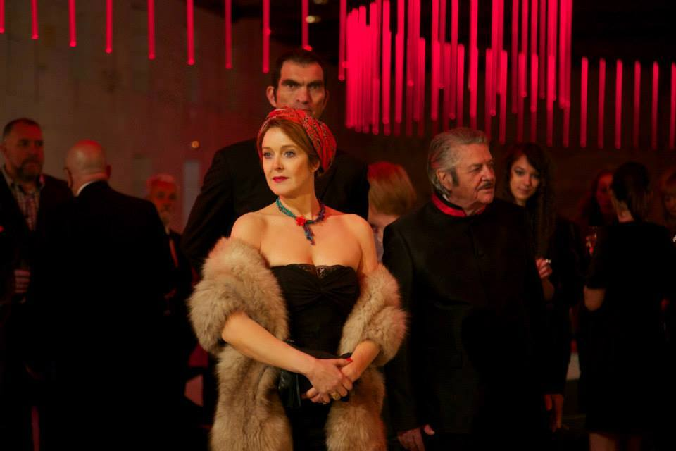 Agnes Soral sur le film "Calomnies" de mocky. 2014